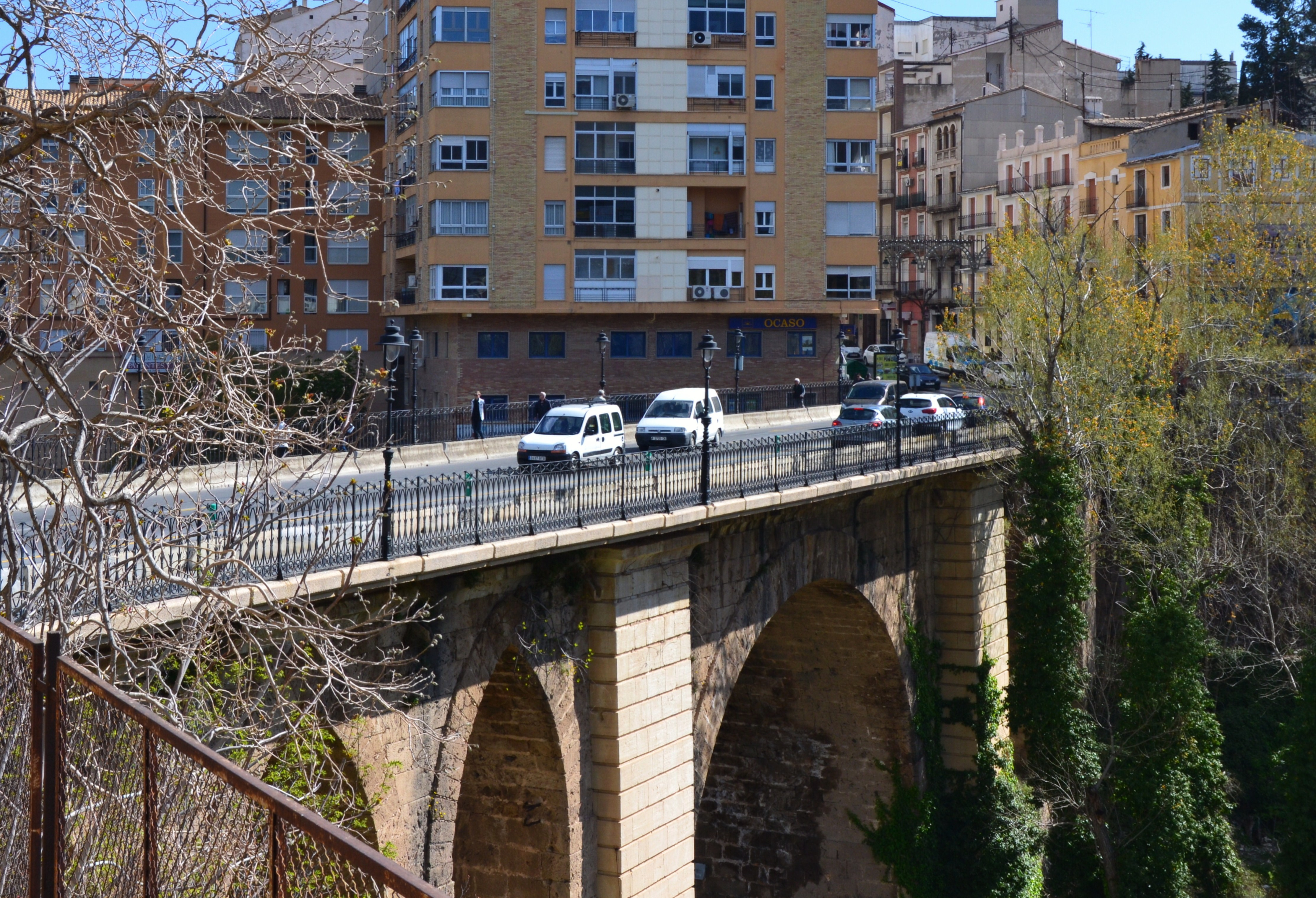 Pont de Maria Cristina, Alcoi.